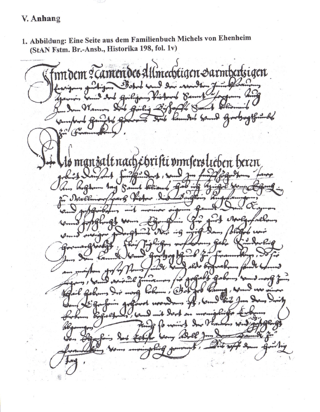 Anfang der Familienchronik des Michael von Ehenheim, Staatsarchiv Nürnberg, Fürstentum Brandenburg-Ansbach, Historika Nr. 198, Blatt 1v